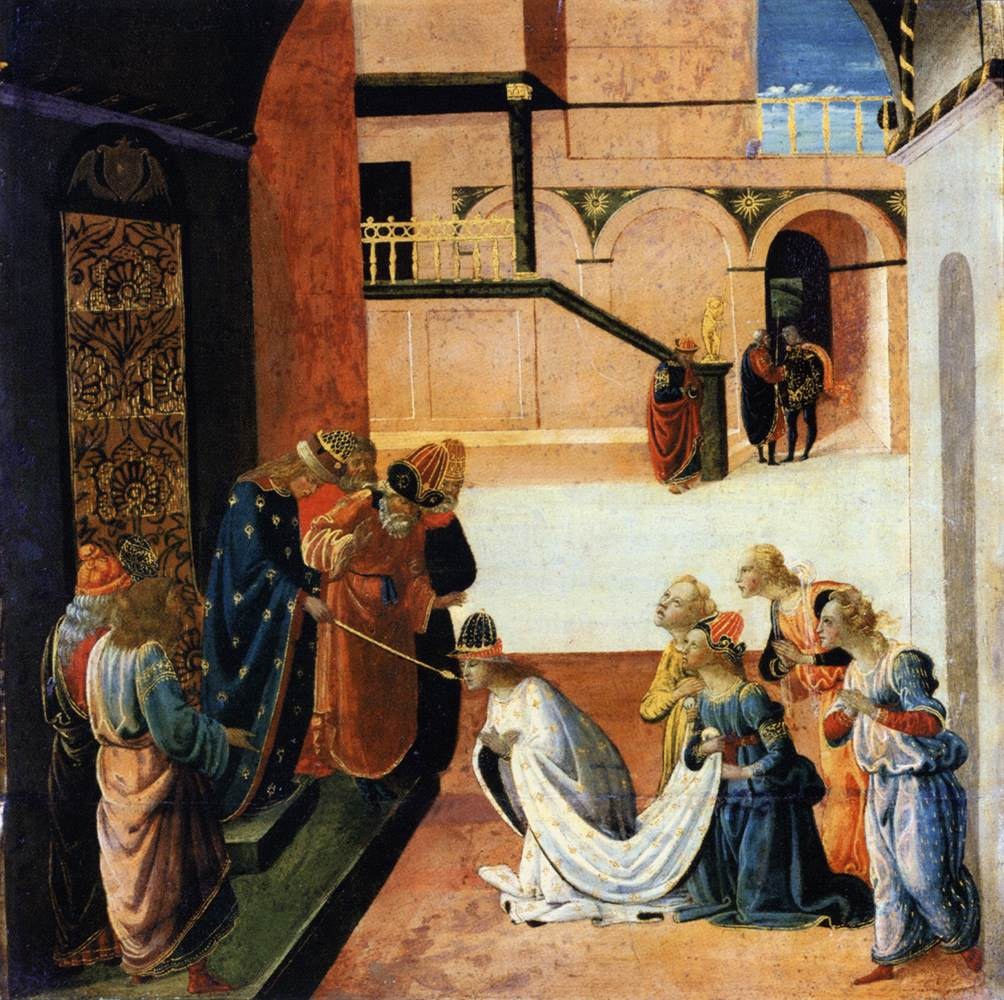 Esther before Ahasuerus